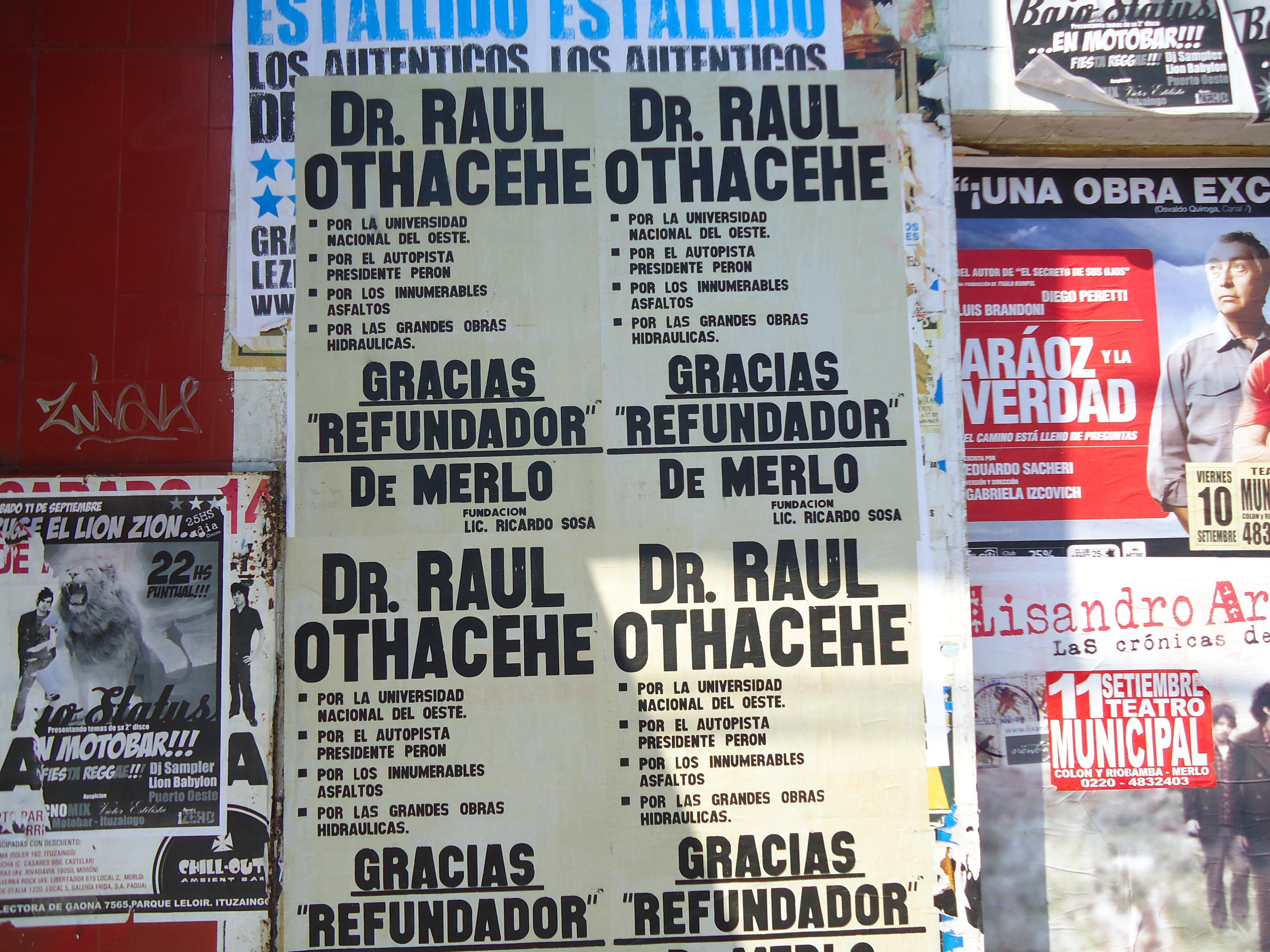 Propaganda en favor del intendente Othacehé.